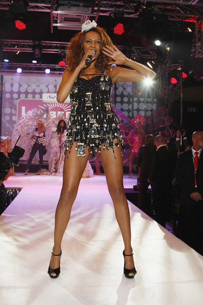 Francisca Urio's Auftritt bei der legendären Lambertz Schoko-Fashion-Show im Alten Wartesaal in Köln